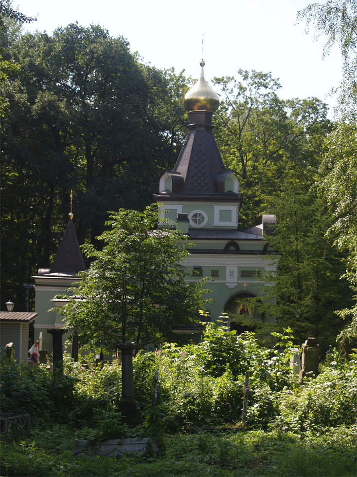 St.Xenia Chapel at Smolensk Cemetery, St.Petersburg, Russia